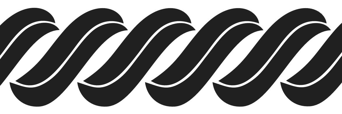 Itiak pulang patang Minang